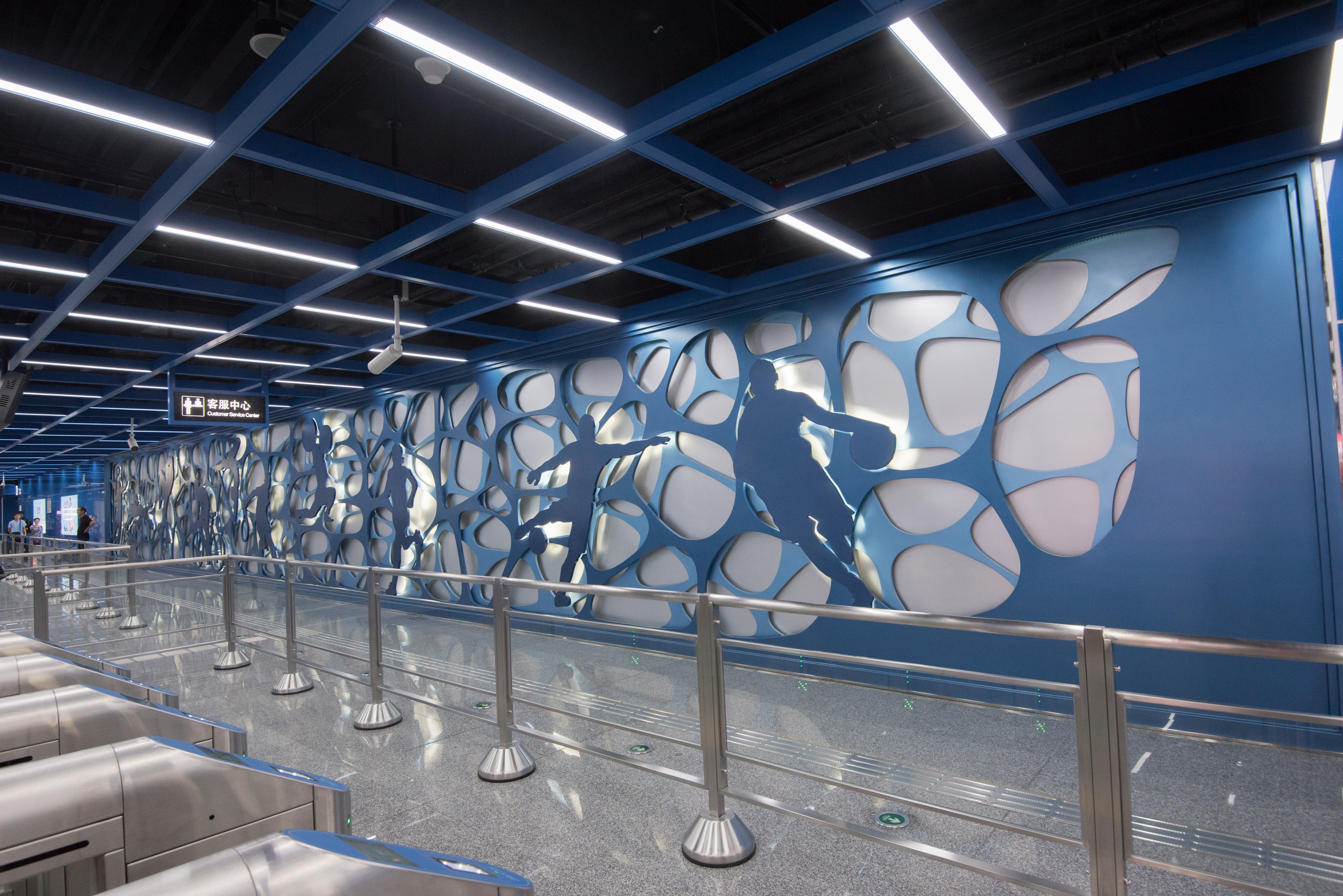 宁波地铁3号线体育馆站艺术墙“甬城律动”